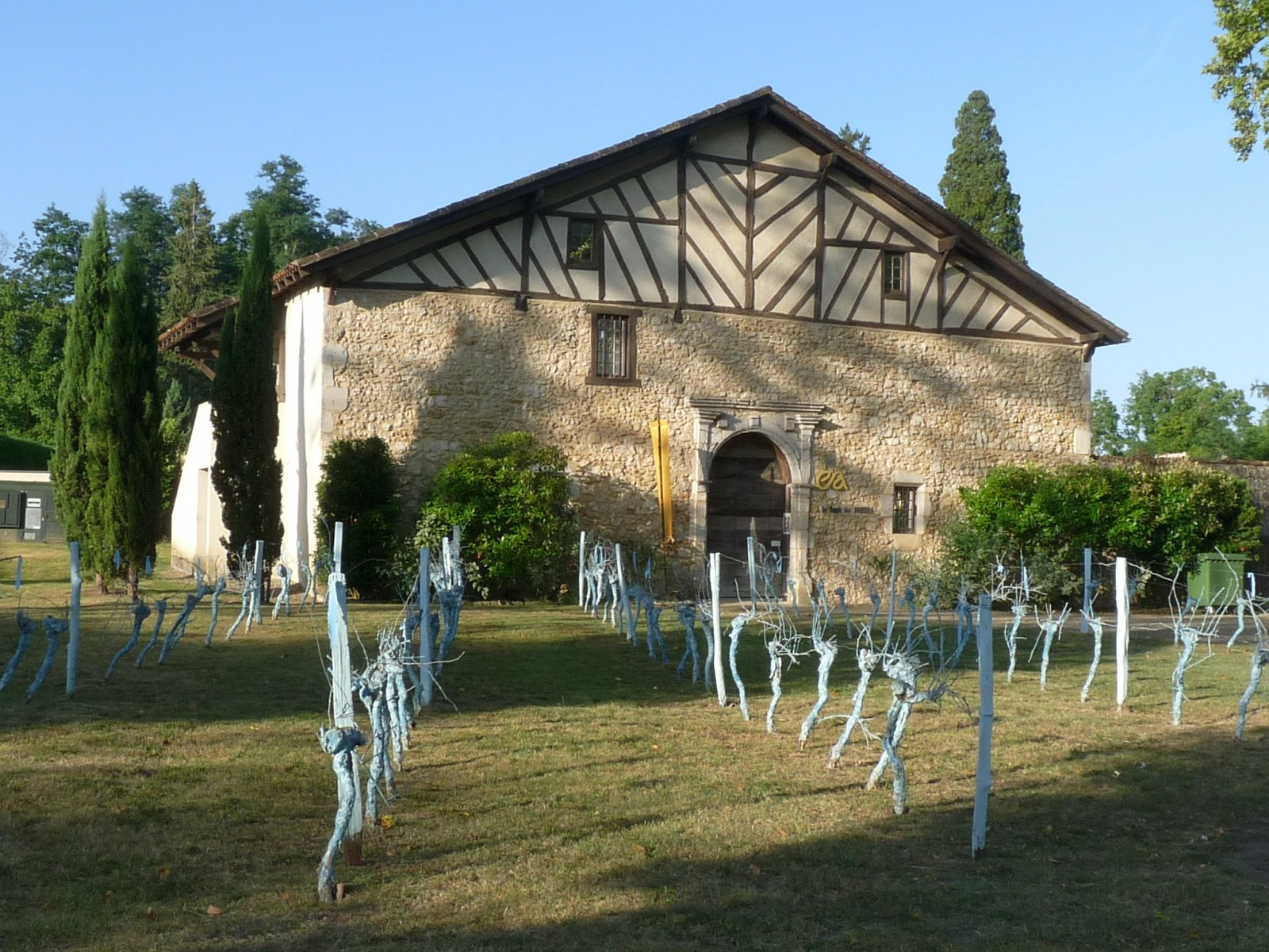 Musée à Labastide-d'Armagnac, Landes, France